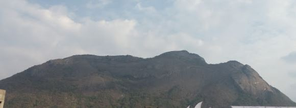 hill